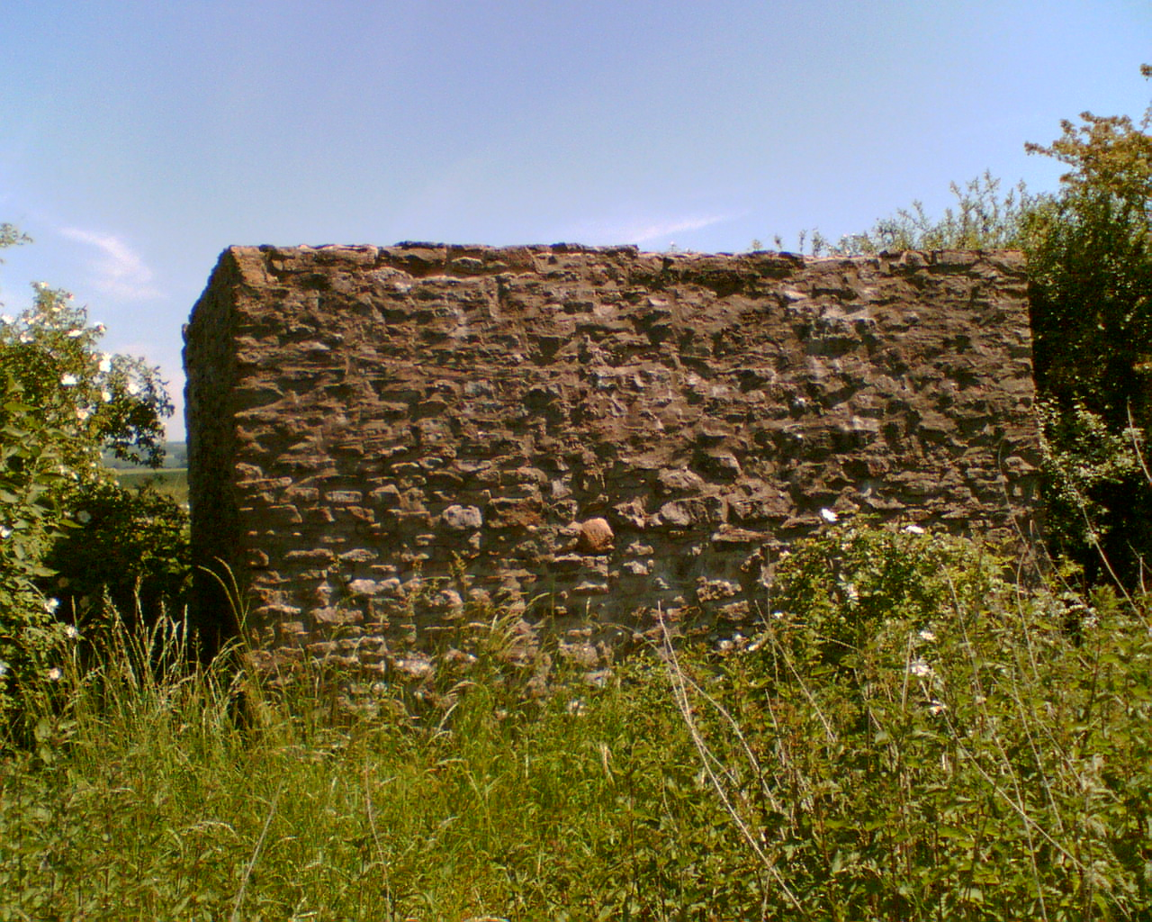 Rest des Turms auf der Höhe bei Barneberg, Deutschland